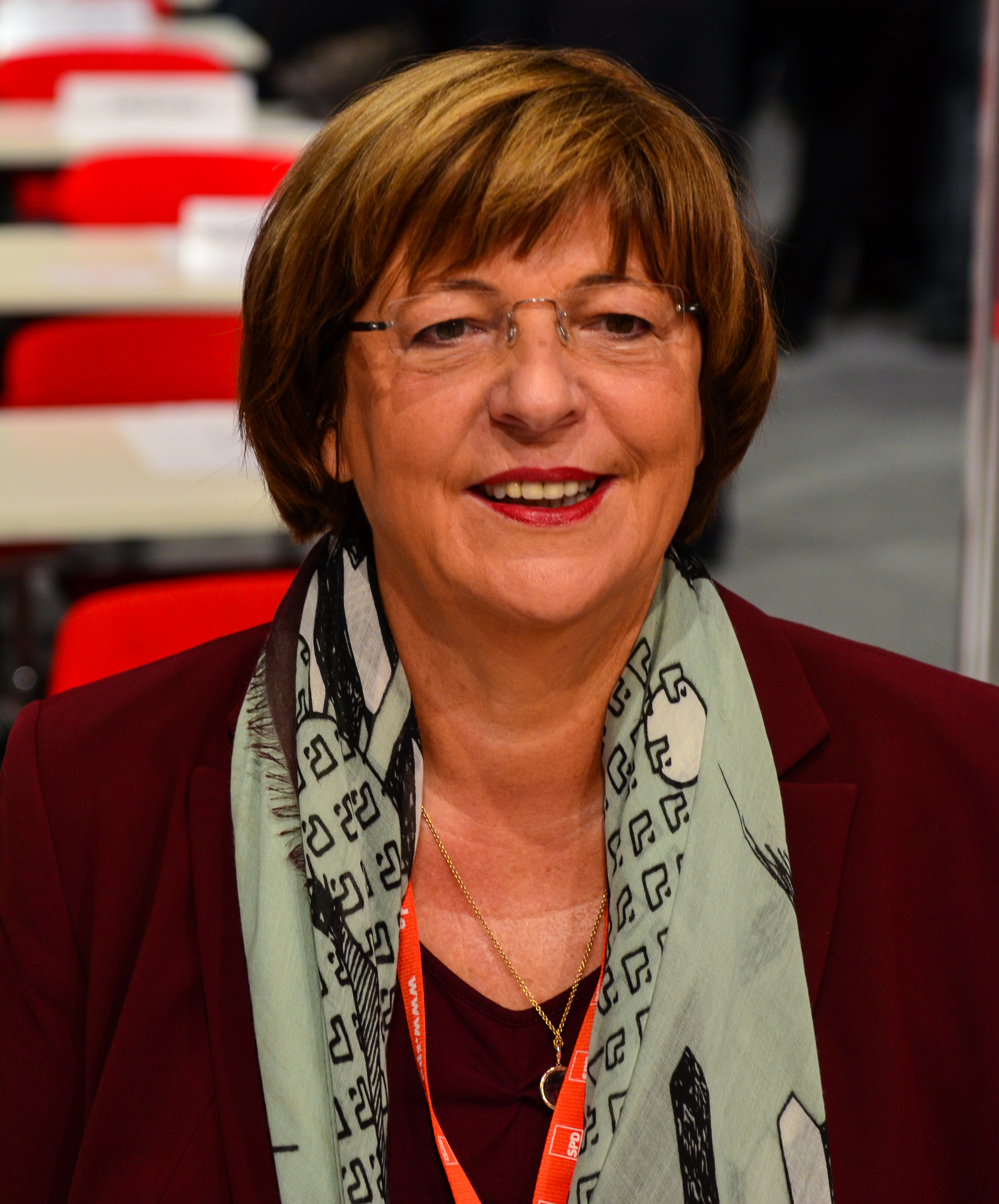 SPD Bundesparteitag 2013 in Leipzig (14.-16. November 2013); Neue Messe